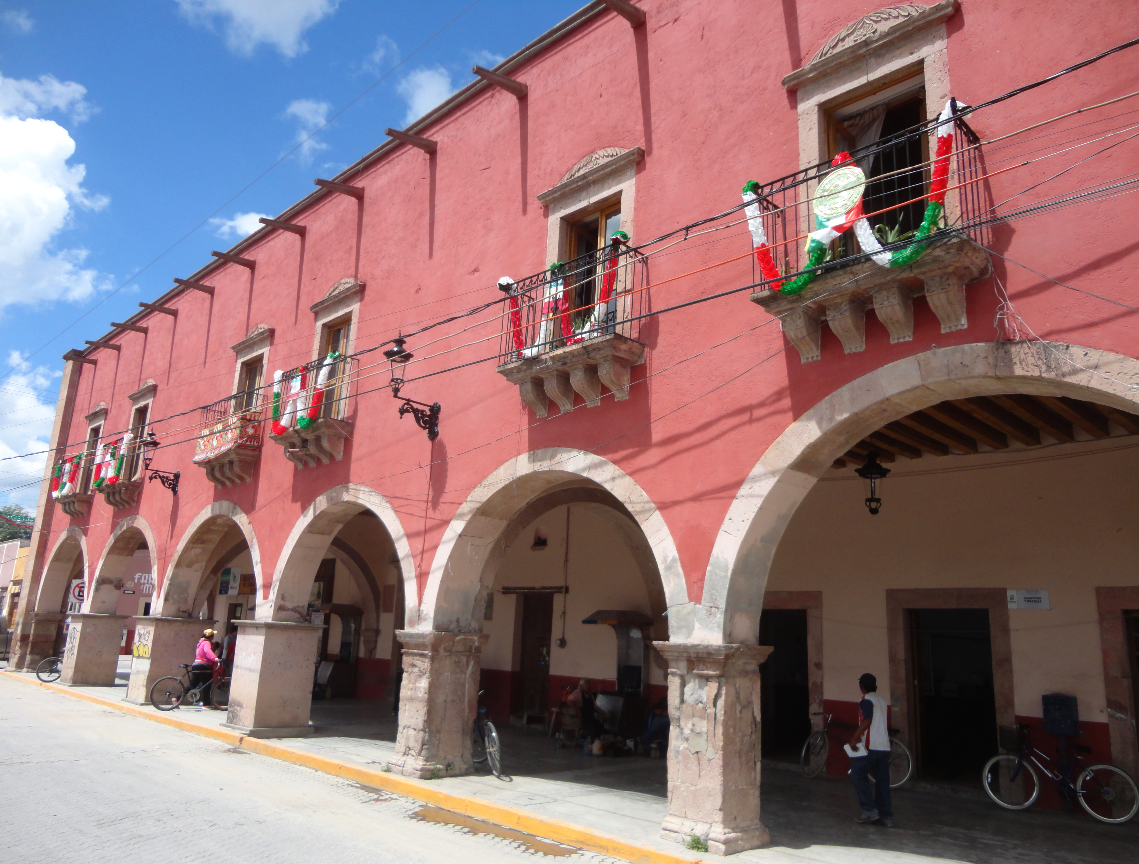 Casa Juárez - San Felipe (San Felipe Torresmochas), Guanajuato, México.